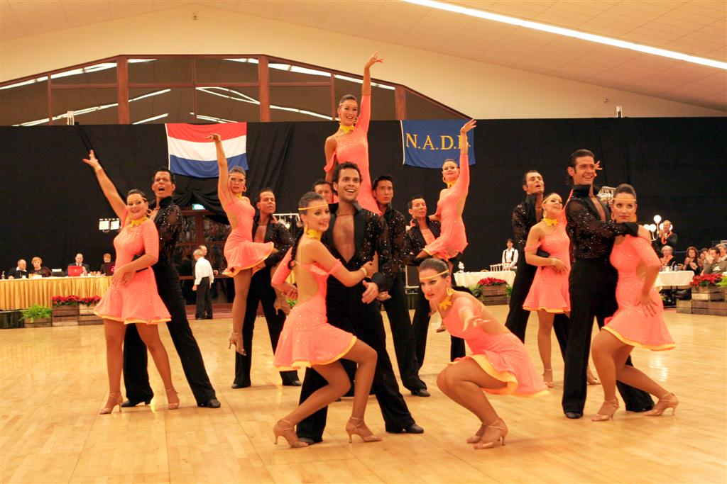 Eindpose Vida Latin Formation